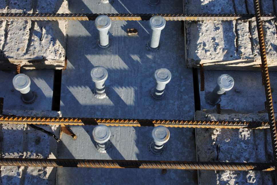 Feuerverzinkte Stahlträger mit Kopfdübelbolzen